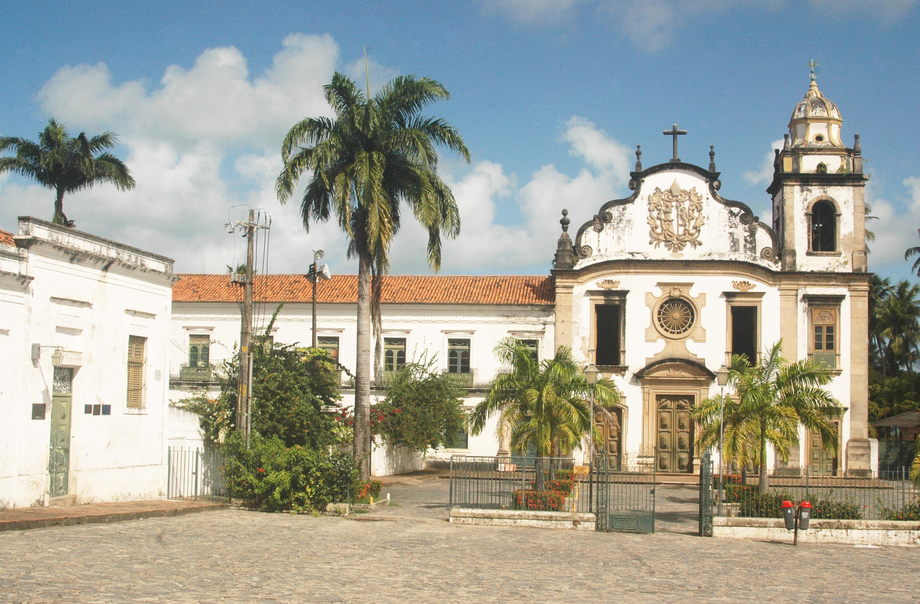 Localizado na Rua de São Bento, Varadouro, o Mosteiro de São Bento é o segundo construído no Brasil. A constução data do século XVI e sua sacristia conventual, elaborada com talhas douradas, espelhos de cristais e painéis, é considerada a mais rica dentre as igrejas de Olinda. Foto: Passarinho/Pref.Olinda